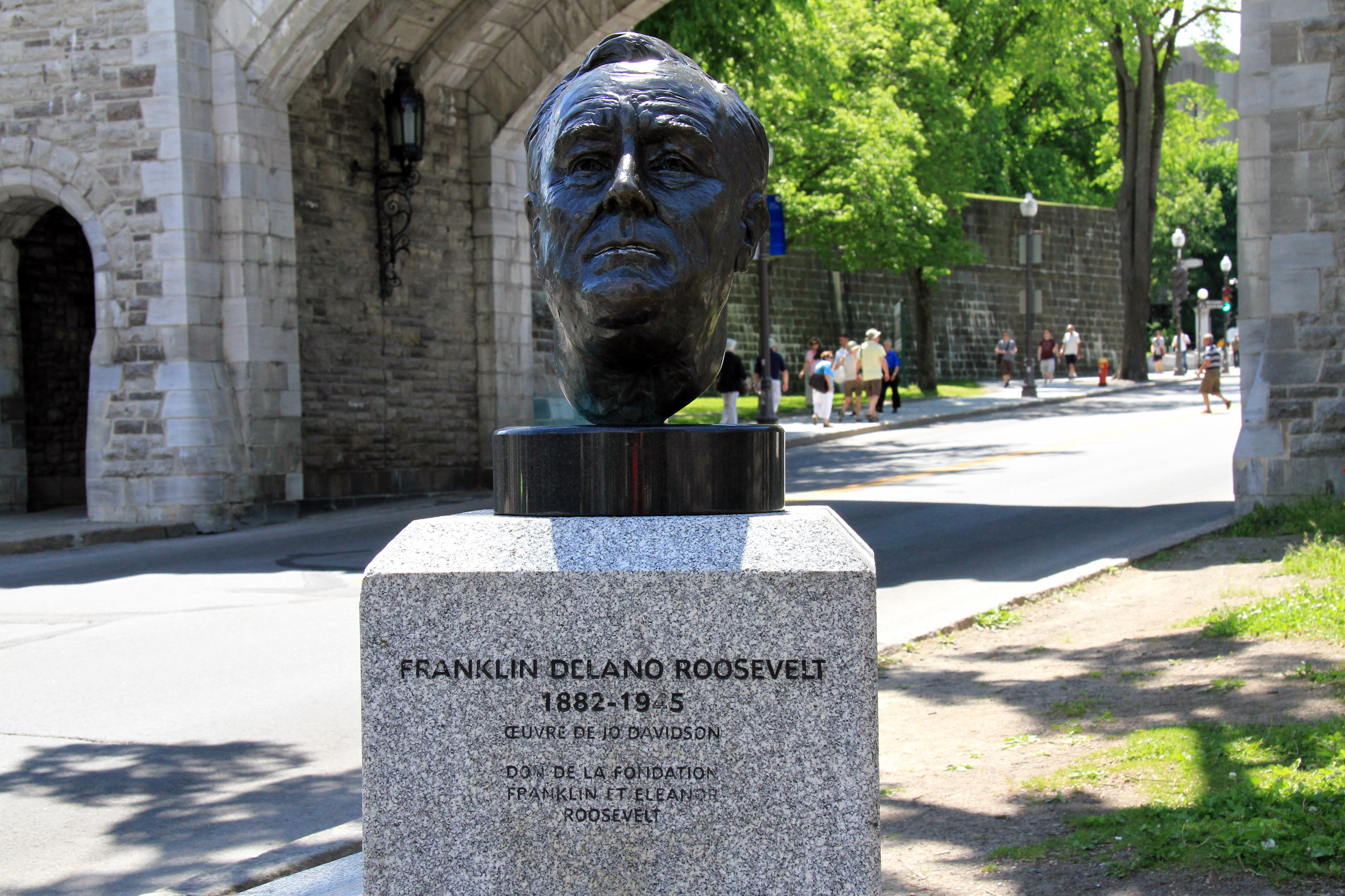 Le buste de l'ancien président américain, Franklin Delano Roosevelt, au monument aux Conférences de Québec sur le parc de l'Esplanade, sur la rue Saint-Louis à Québec. Le buste, dévoilé en 1998, est l'oeuvre du sculpteur américain Jo Davidson (source).